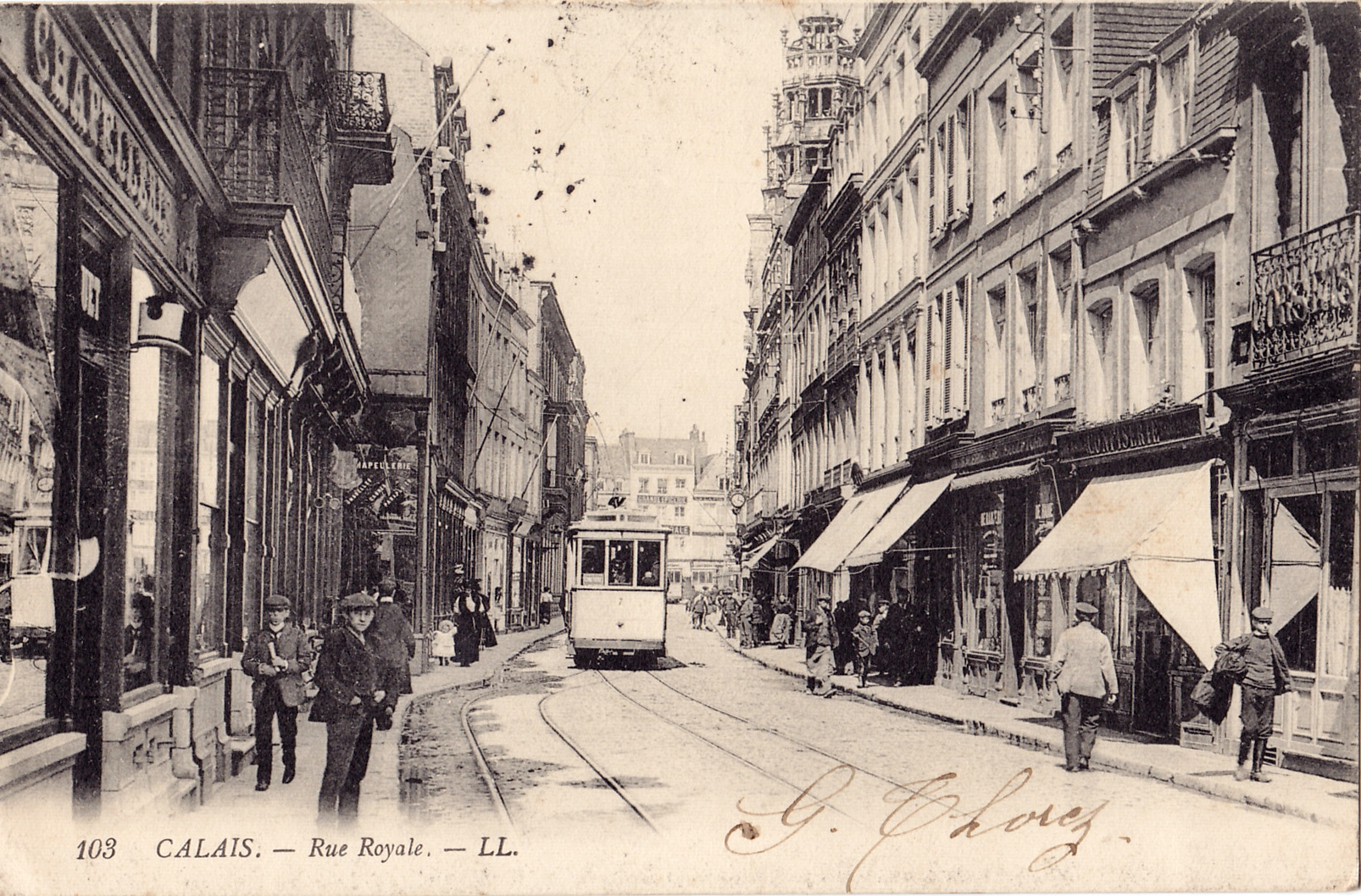 Carte postale ancienne éditée par LL, n°103 : CALAIS - Rue Royale